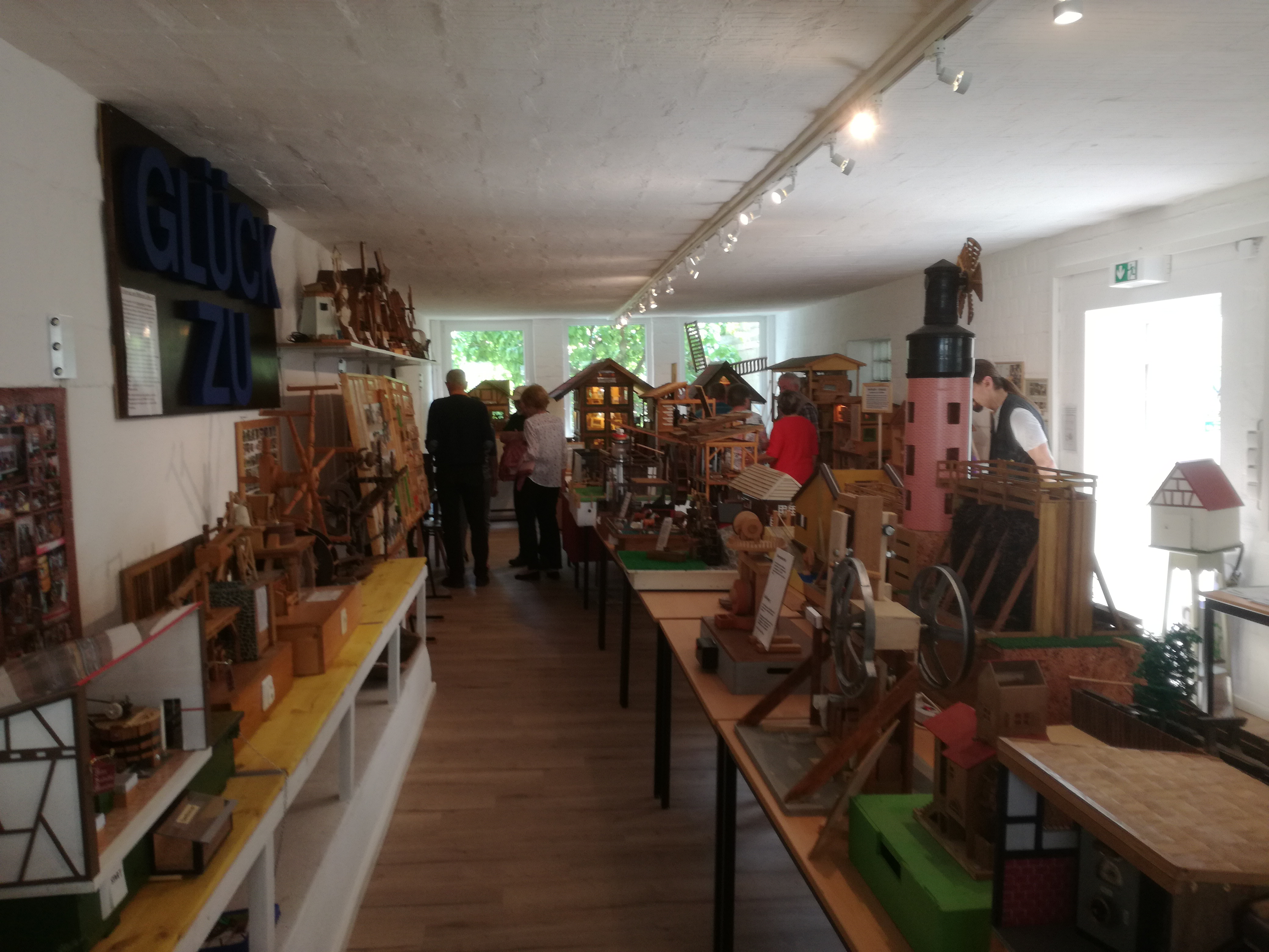 Mühlenmodell-Ausstellung in der "Erlebniswelt Mühlen" in Dauernheim im Dorfmittelpunkt am Grillplatz.